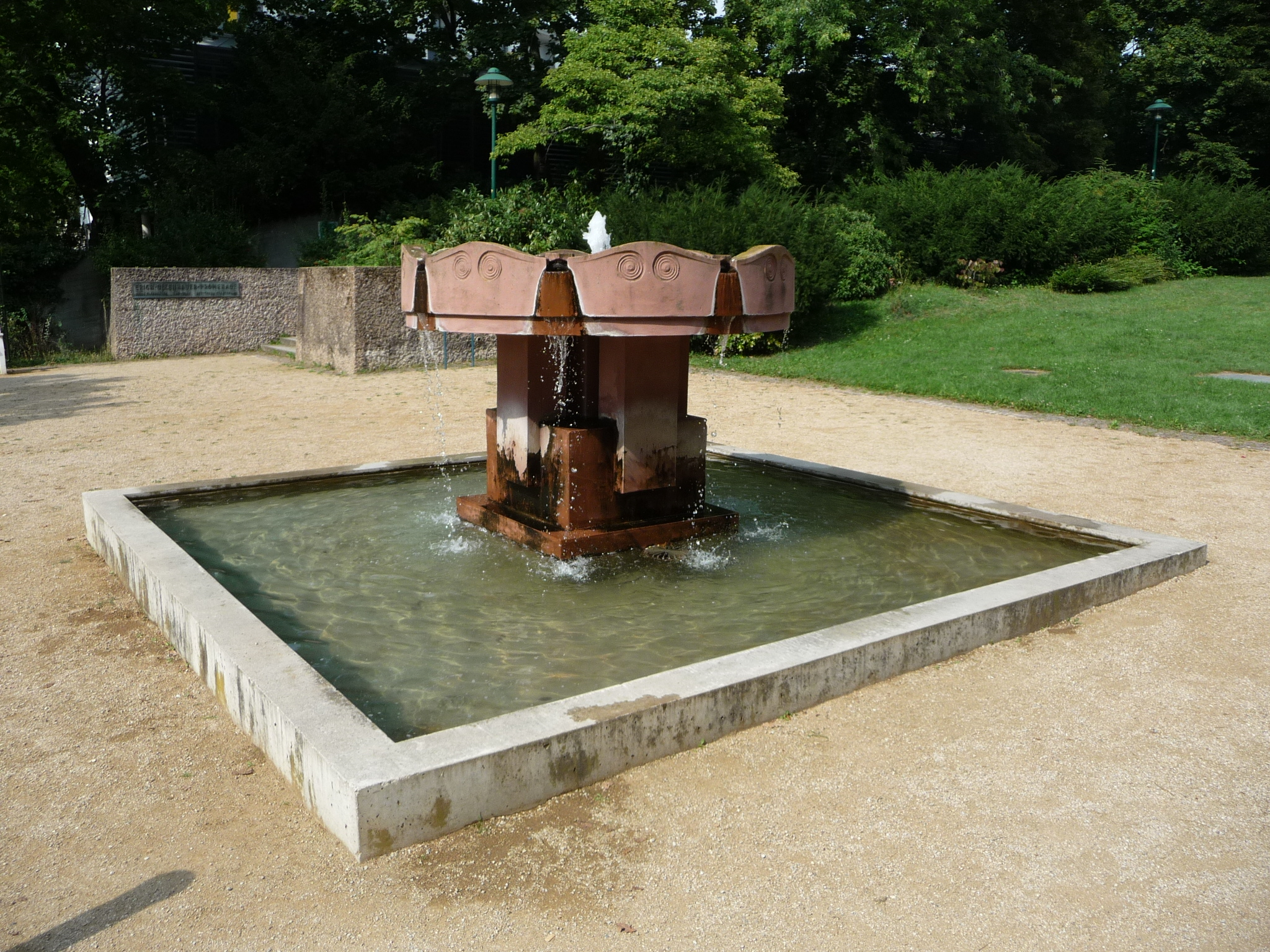 Die Mathildenhöhe in Darmstadt wurde nach Mathilde Karoline Friederike von Wittelsbach, der Gemahlin Großherzogs Ludwig III., benannt.